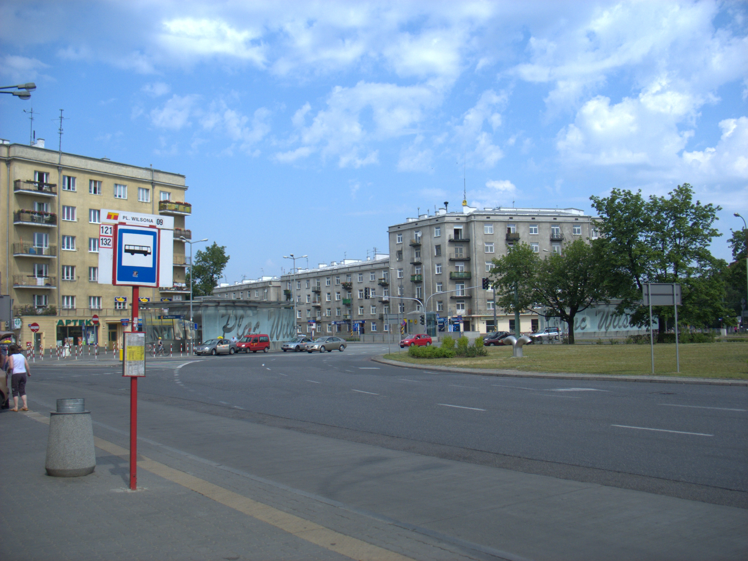 Plac Wilsona w Warszawie - widok na plac